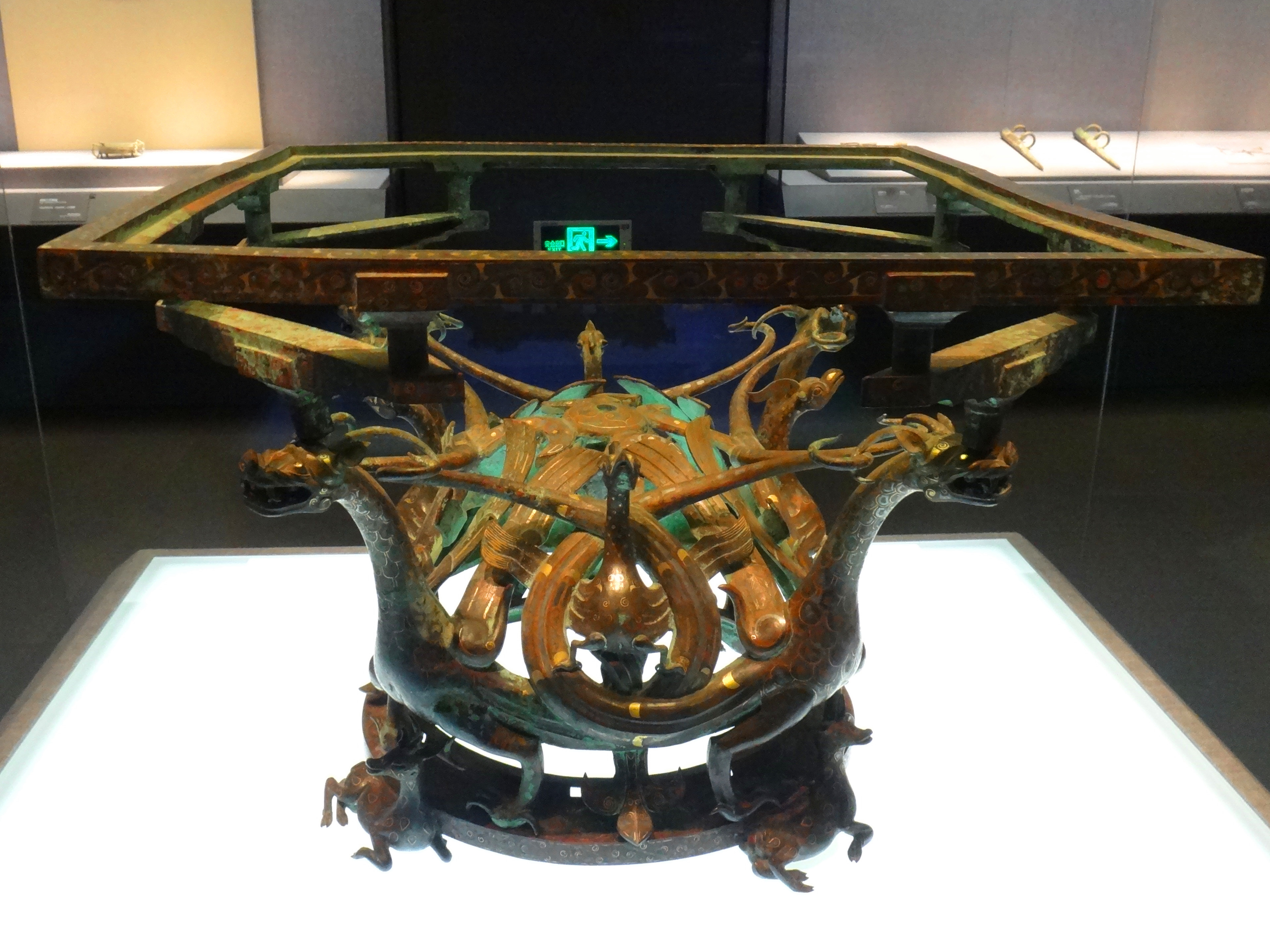 错金银四龙四凤铜方案座